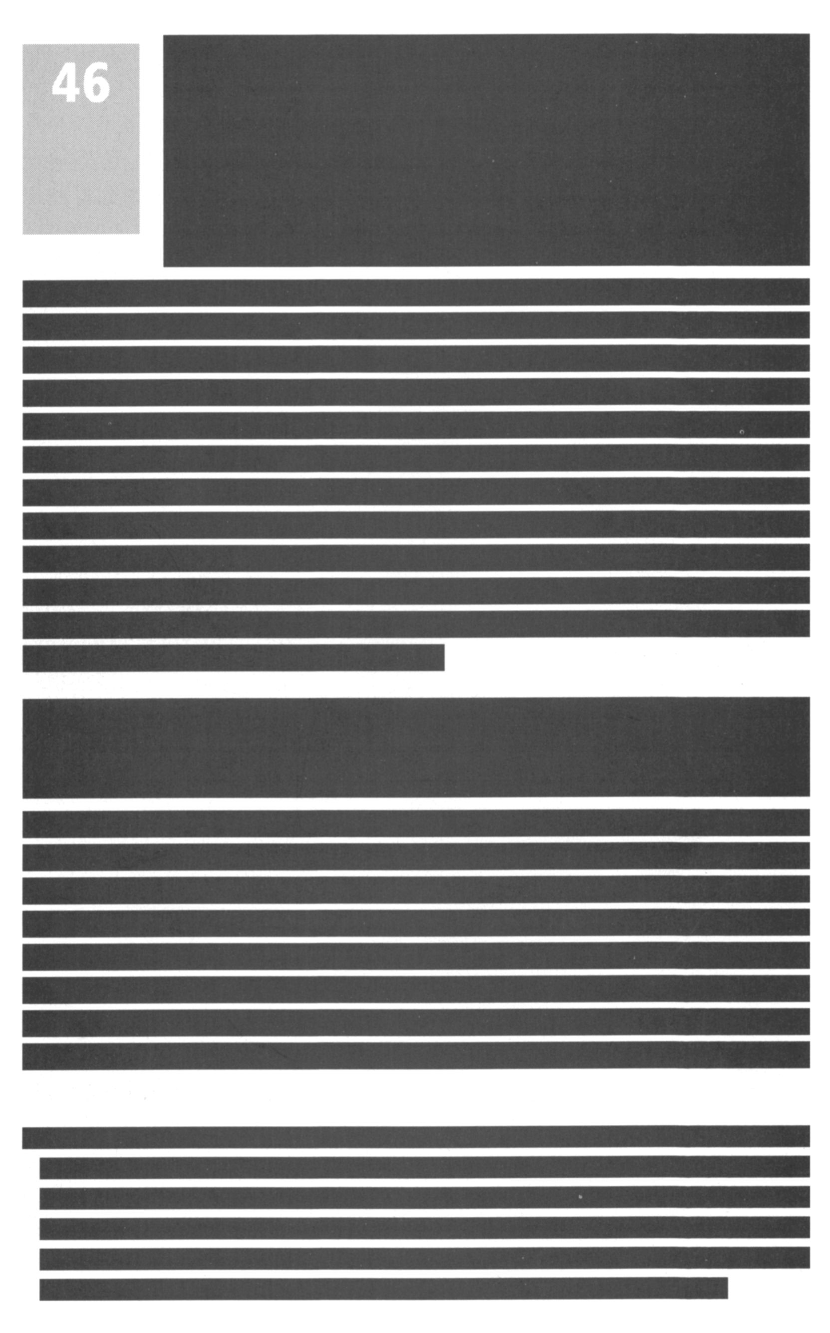 Geschwärzte Seite des Arzneiverordnungs-Reports 97